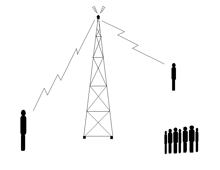 Individueel gesprek